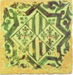 Armes de la reina Margarida de Prades en un taulell de ceràmica valenciana possiblement procedent de l'antic Palau Reial de València / Coat of arms of the queen Margarida de Prades, wife of Martin of Aragon, in a tile of valencian ceramics possibly coming from the old Royal Palace of València